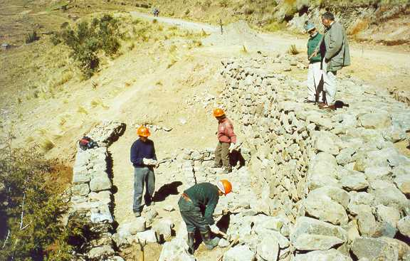 Construyendo una presa filtrante para la retención de material sólido. Puno - Perú.